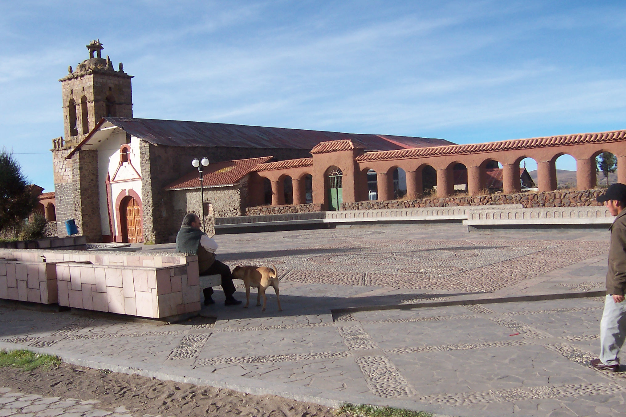 Chucuito, Puno, Perú. Vista general de una igleria